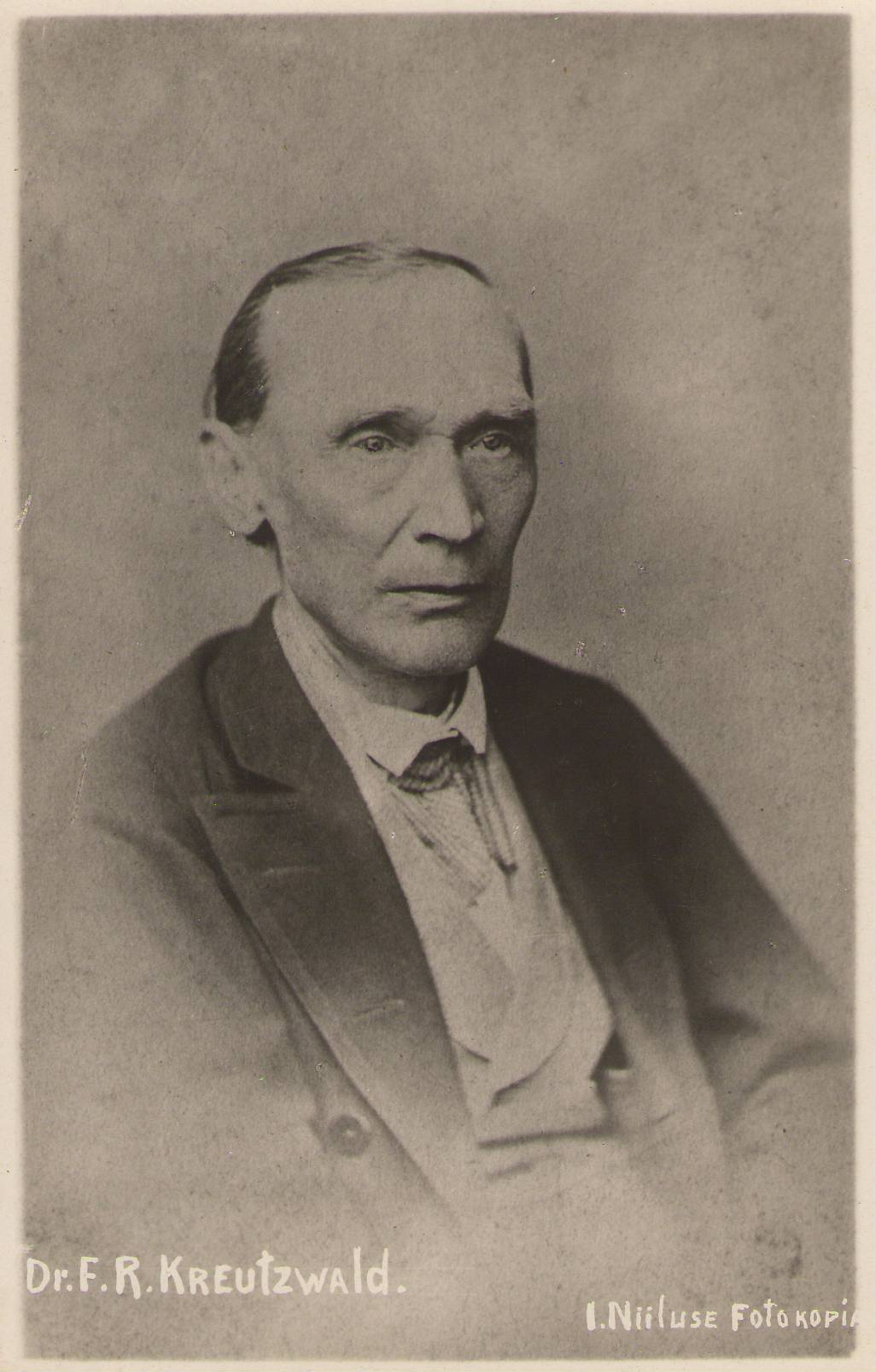 MuuseumikoguFotokogu OlemusfotoSäilivushea